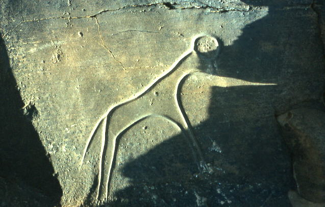 Gravures préhistoriques de la région d'El Bayadh, Algérie